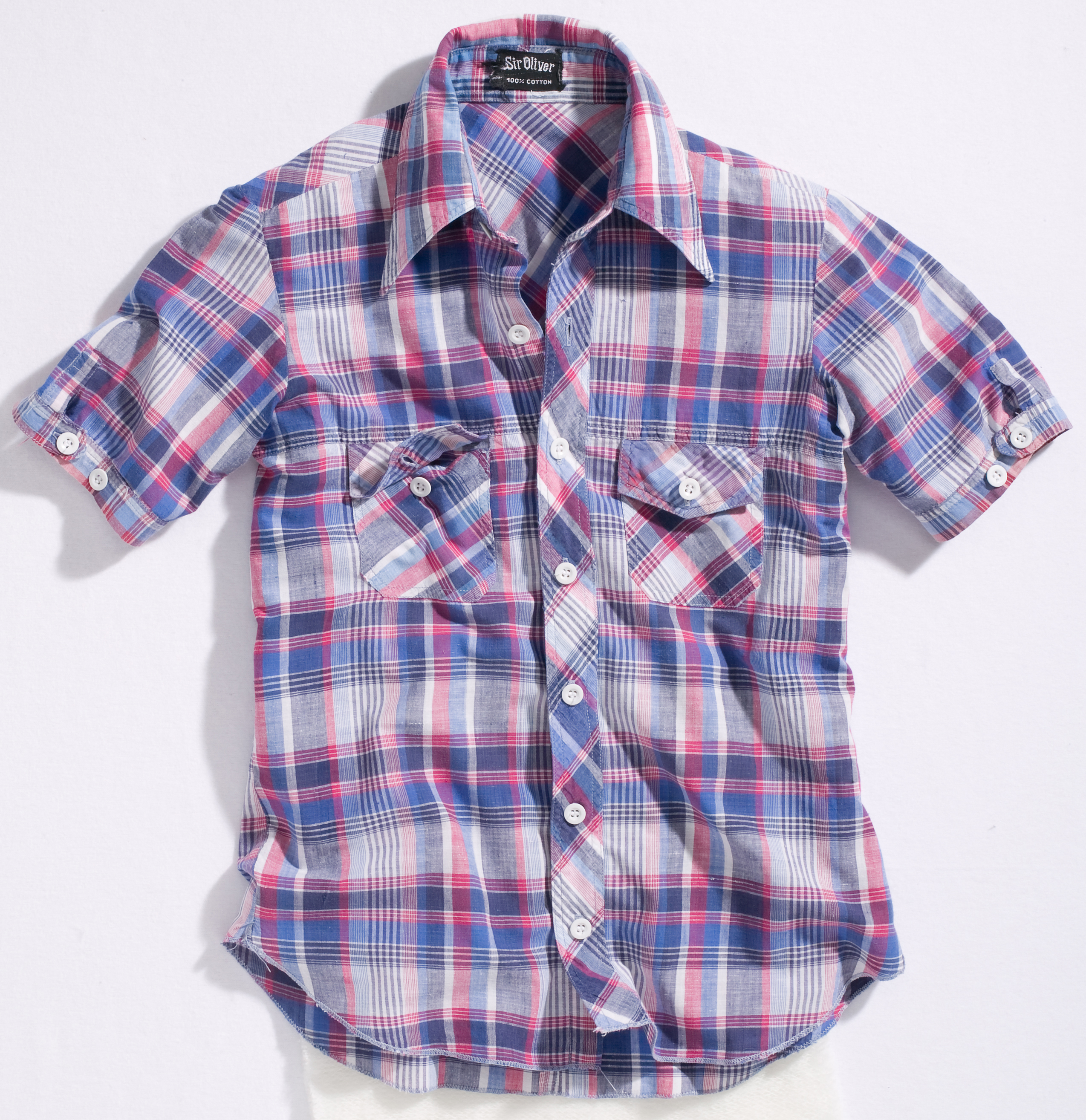 erstes Sir Oliver Madraskarohemd